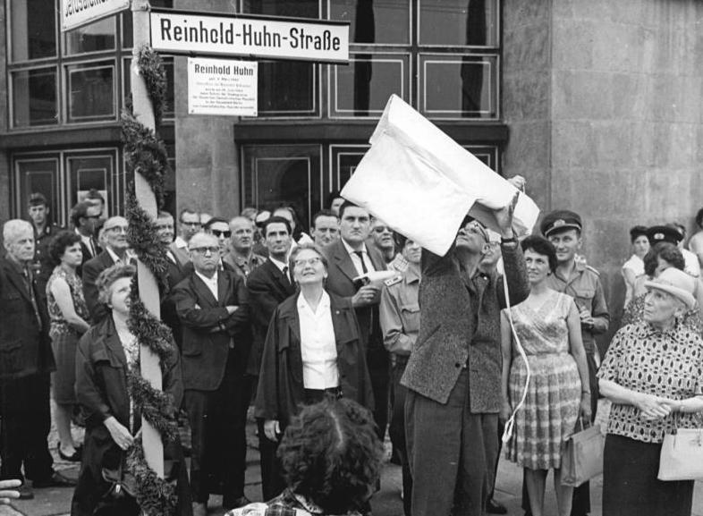 Berlin, Namensgebung Reinhold-Huhn-Straße Zentralbild Franke 12.8.1966 Umbenennung einer Berliner Straße nach ermordeten Grenzsoldaten Reinhold Huhn am 12.8.1966. Im Zusammenhang mit einer Kundgebung anläßlich des 5. Jahrestages der Errichtung des antifaschistischen Schutzwalles wurde die Schützenstraße im Stadtbezirk Mitte in Reinhold-Huhn-Straße umbenannt. Zum gleichen Zeitpunkt erfolgte auch die Umbenennung der Strelitzer Straße in Egon-Schultz-Straße.